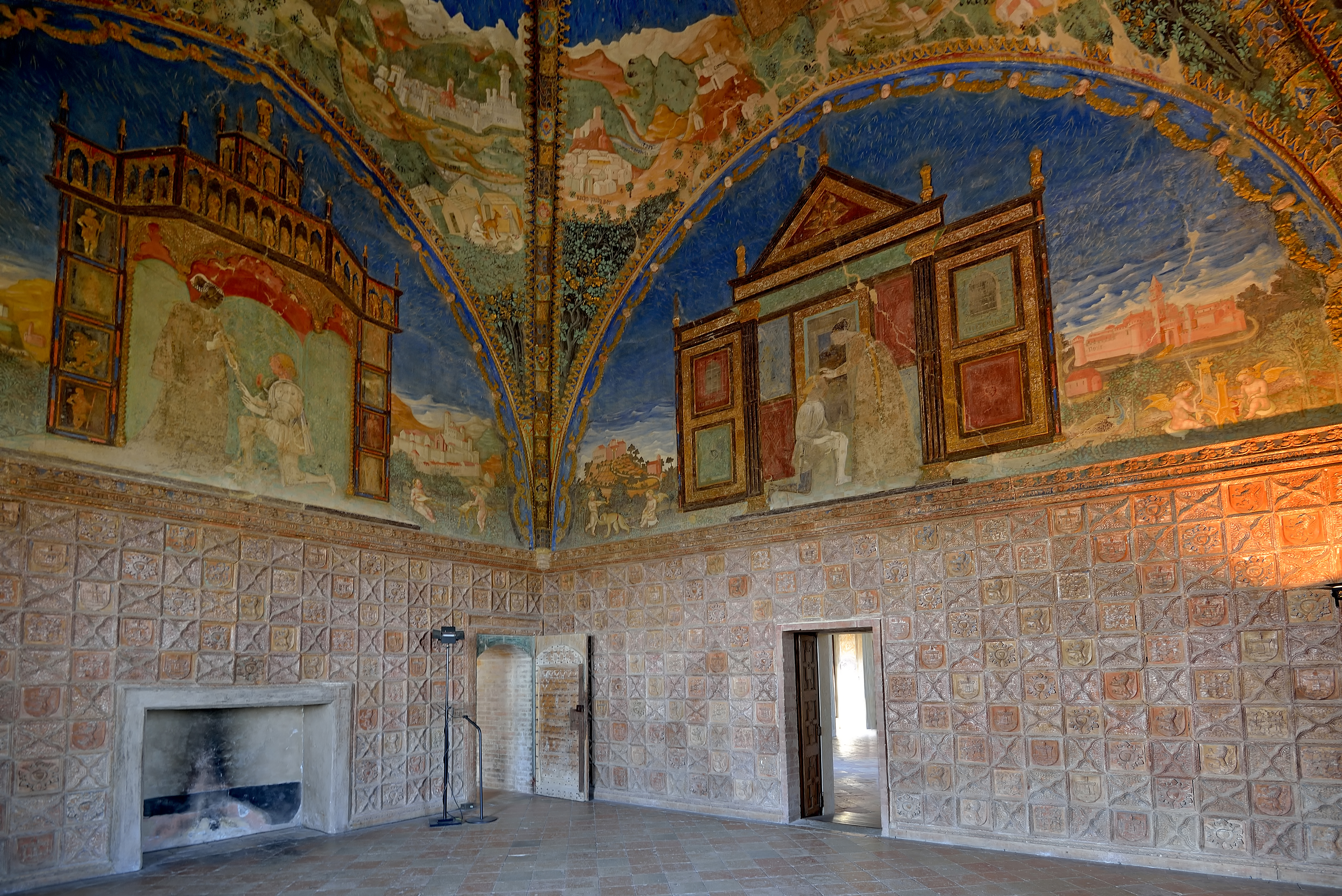 castello di Torrechiara. Camera d'Oro, l'ambiente, nato probabilmente quale camera da letto e studiolo privato di Pier Maria II de' Rossi, è noto per il ciclo di affreschi dipinti probabilmente da Benedetto Bembo nel 1462 This is a photo of a monument which is part of cultural heritage of Italy.